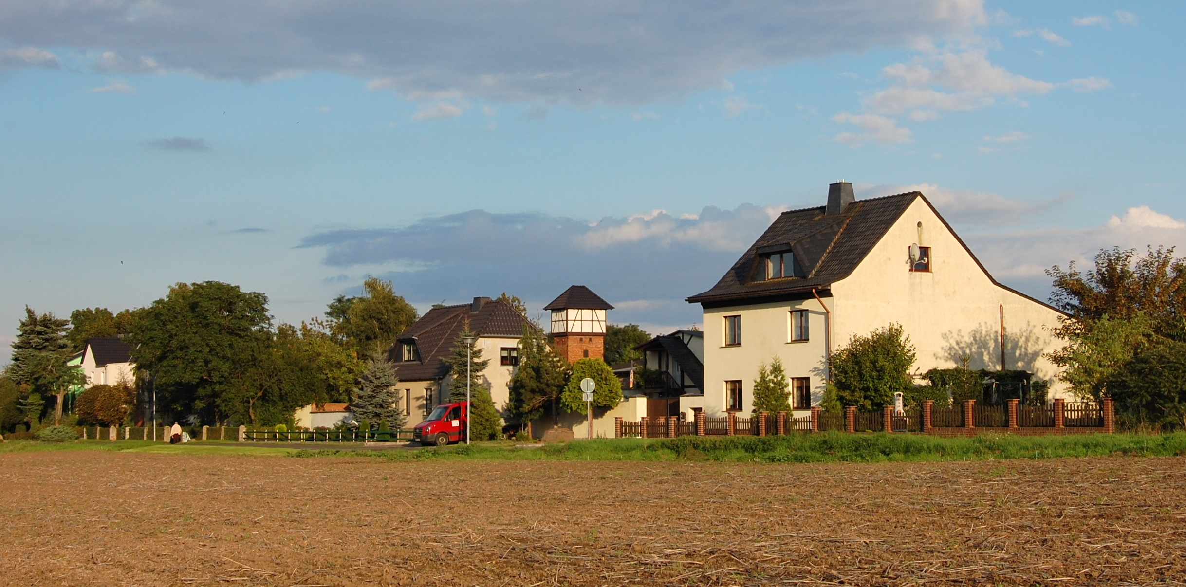 Siedlung Willishof bei Westerhüsen, Straße In der Mittelwiese, Blick von Nordwesten